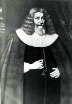 Portraitaufnahme Gottschalk von Wickede